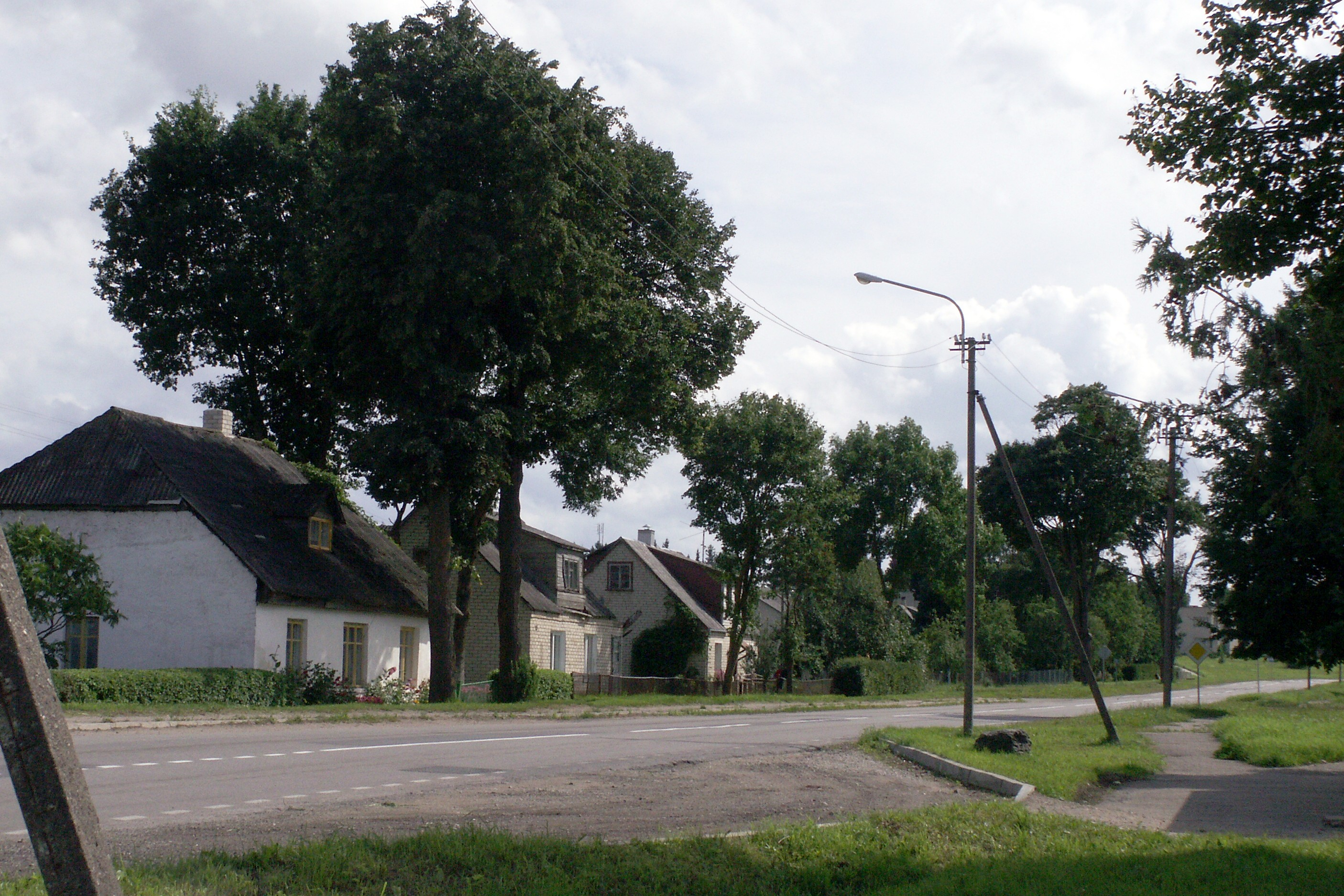 Varputėnai, Šiaulių rajonas